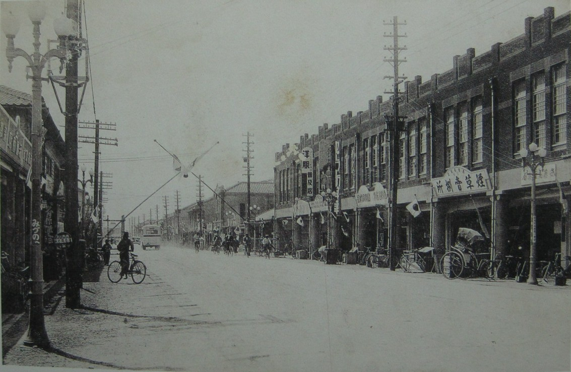 中文（台灣）: 日治時期高雄市的山下町通，即今天高雄市鼓山區的鼓山一路